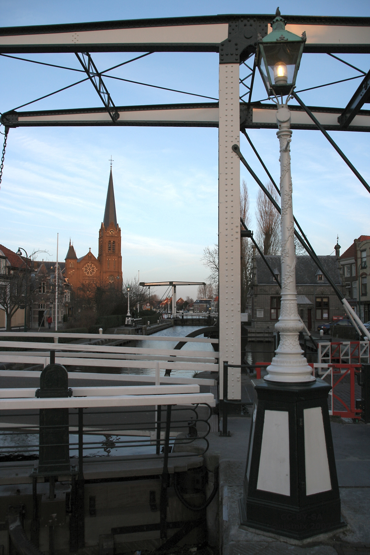 Sluis in de Vliet bij Leidschendam